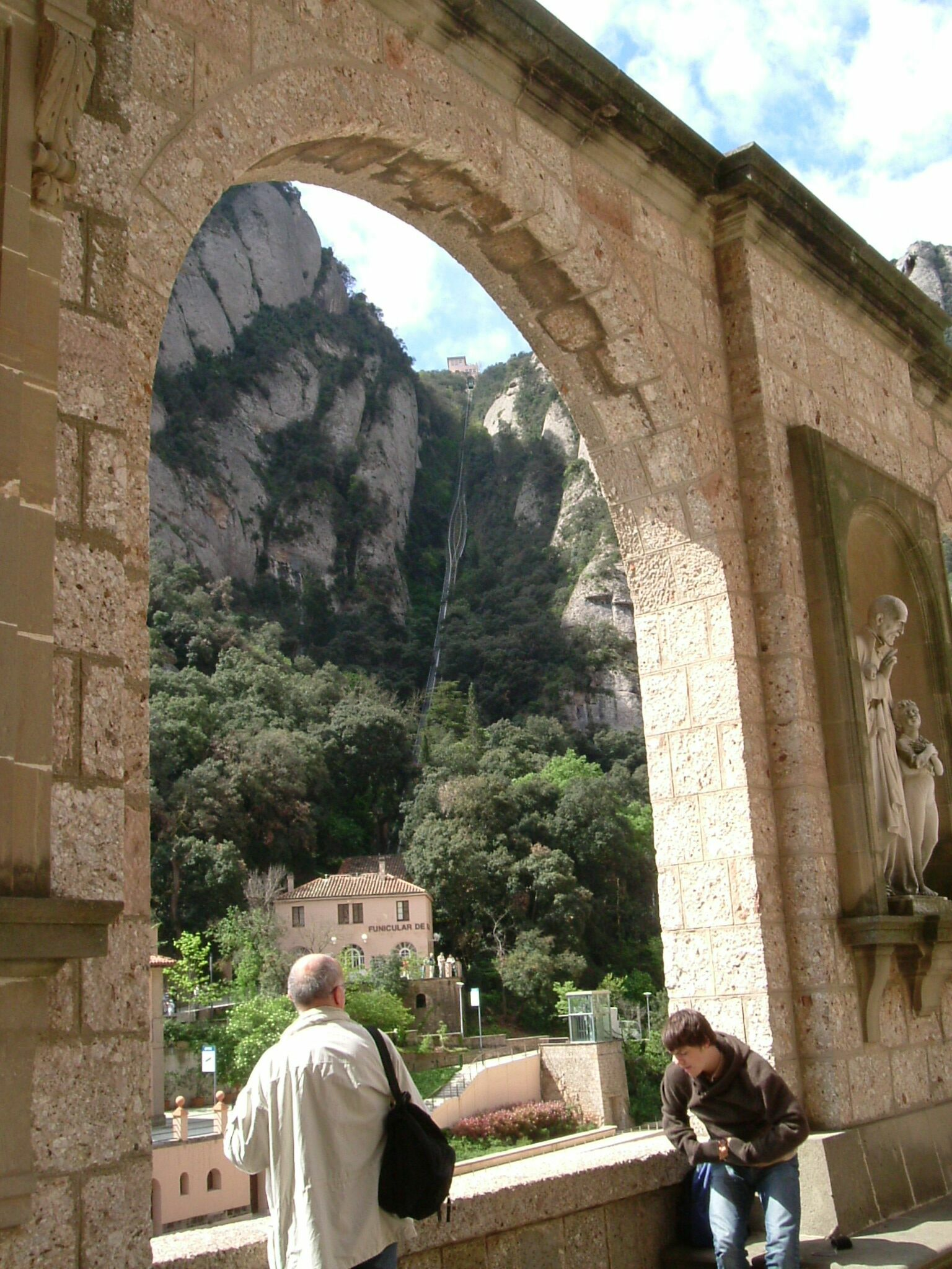 Montserrat Funicular, Montserrat, Spain